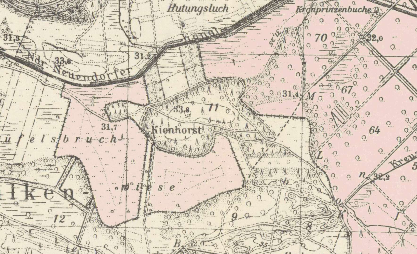 Ausschnitt aus dem im Messtischblatt 3444, koloriert